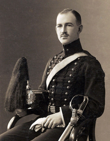 Yngve Stiernspetz